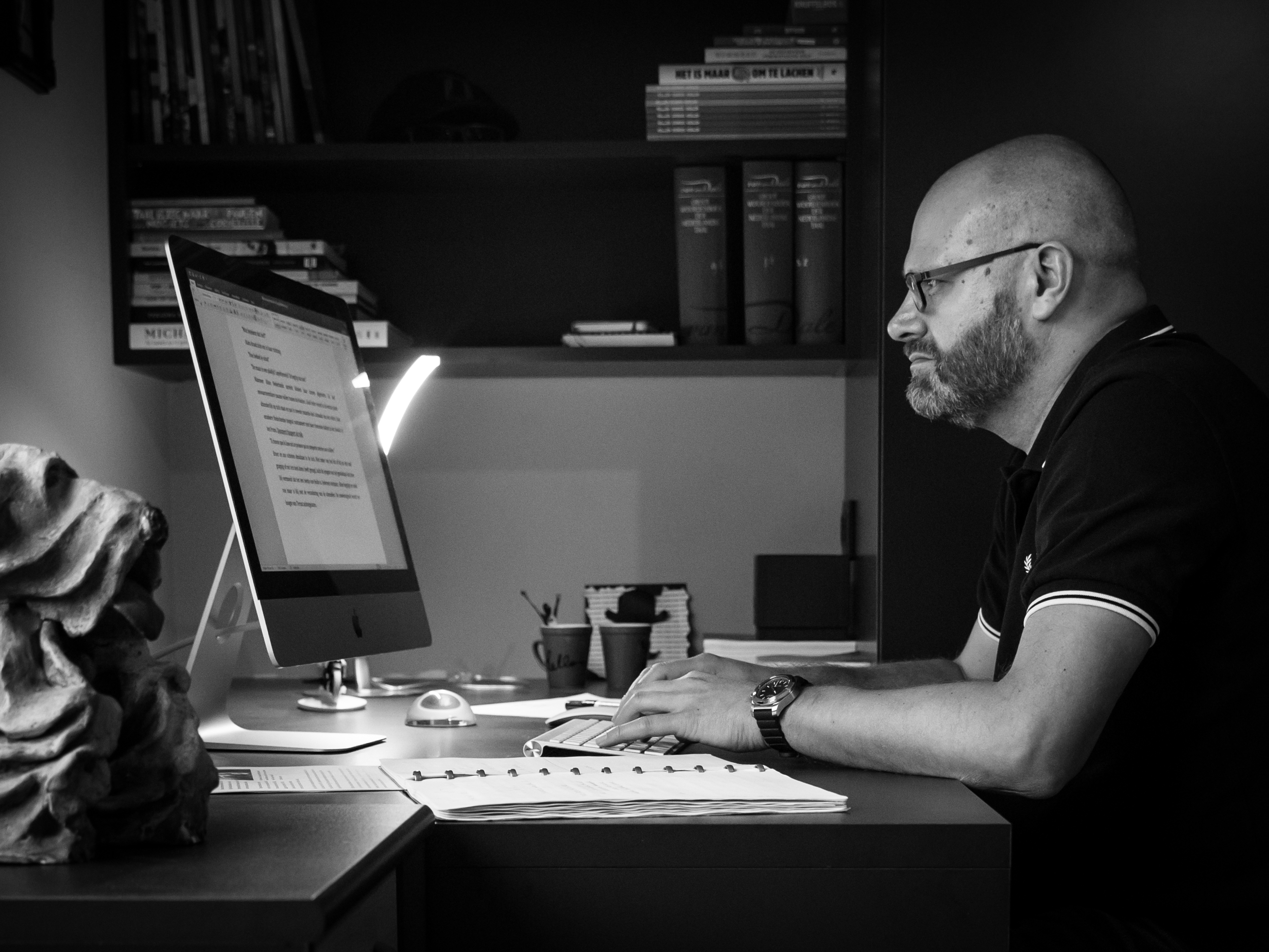 Dimitri Verbelen in zijn schrijfkamer, werkend aan het manuscript van zijn tweede roman 'Bovenhuids'.